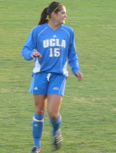 Kara Lang of UCLA at Santa Clara